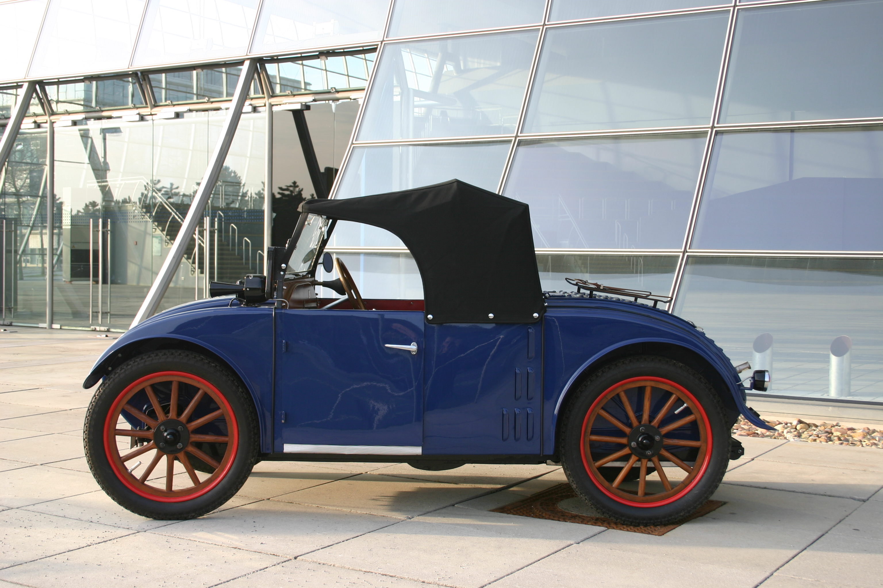 1927er Hanomag auf dem expo Gelände in Hannover